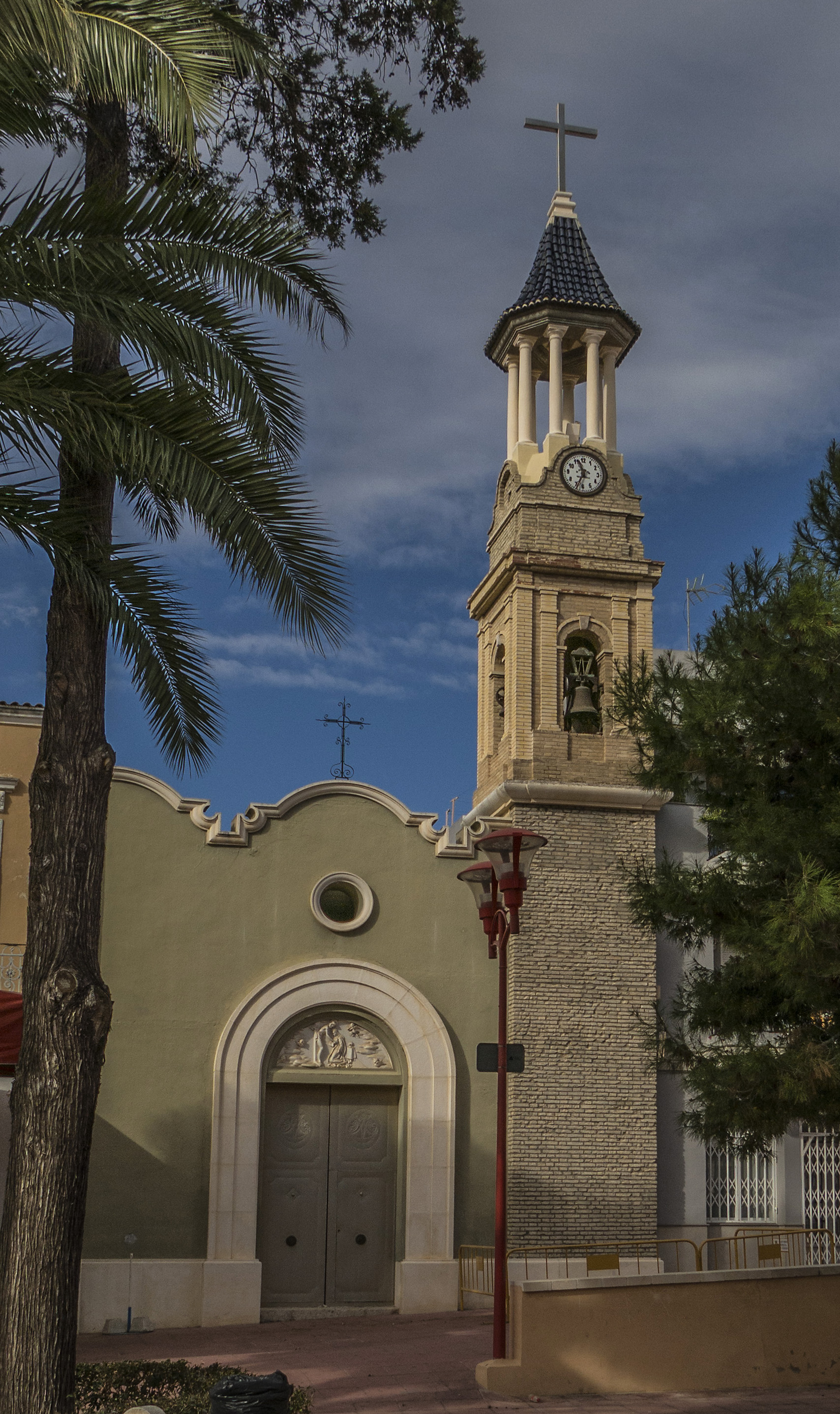 Benicull de Xúquer és un municipi valencià que es troba a la comarca de la Ribera Baixa. Limita amb Corbera i Polinyà de Xúquer (a la mateixa comarca); i amb Alzira (a la comarca de la Ribera Alta).